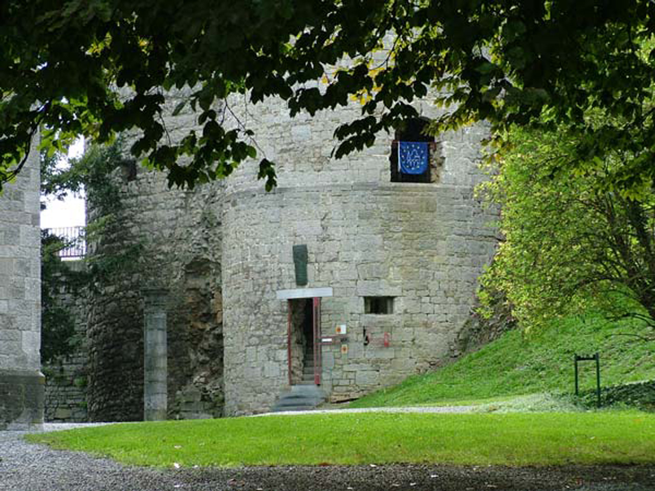 Het Gravenkasteel, Château Comtal de Rochefort